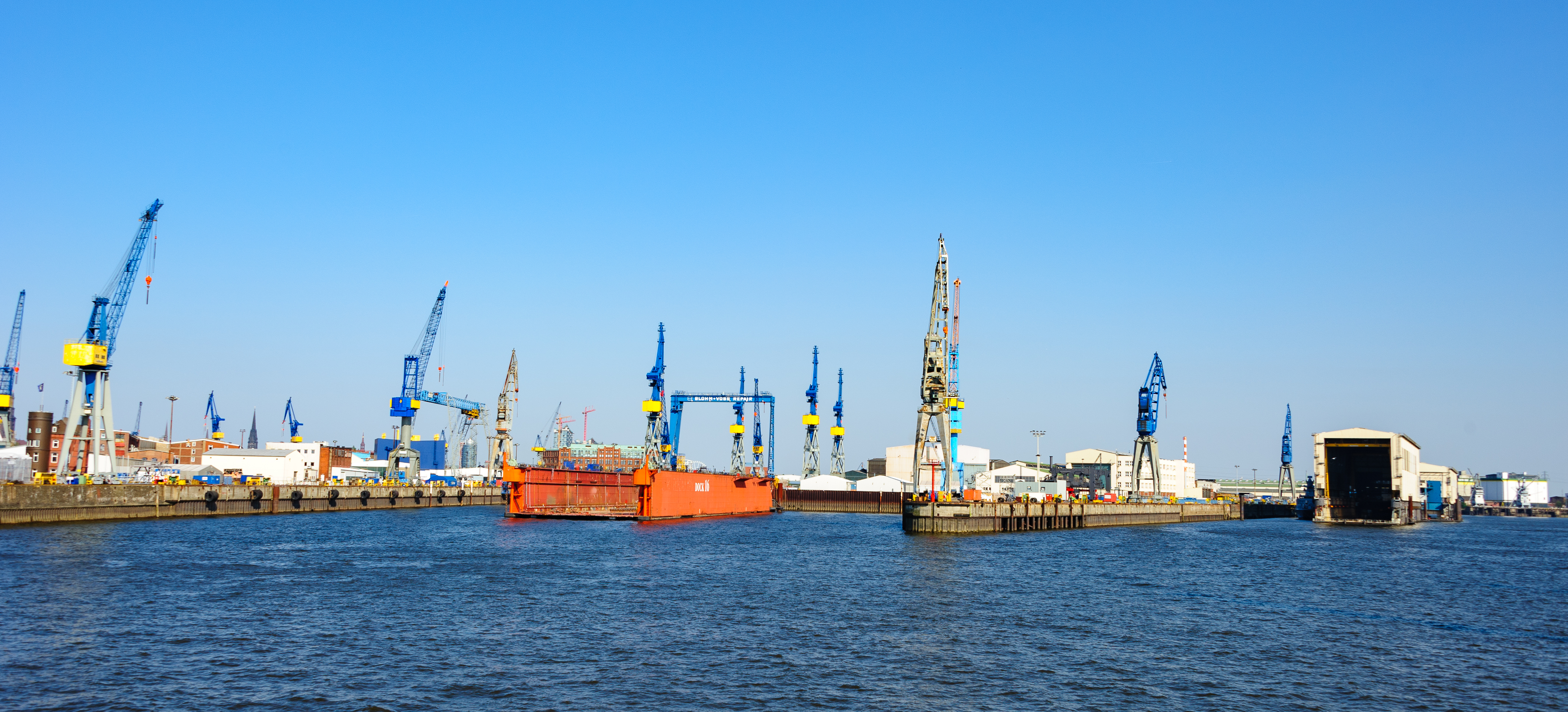 Hamburg Werfthafen Blohm+Voss Dock 16